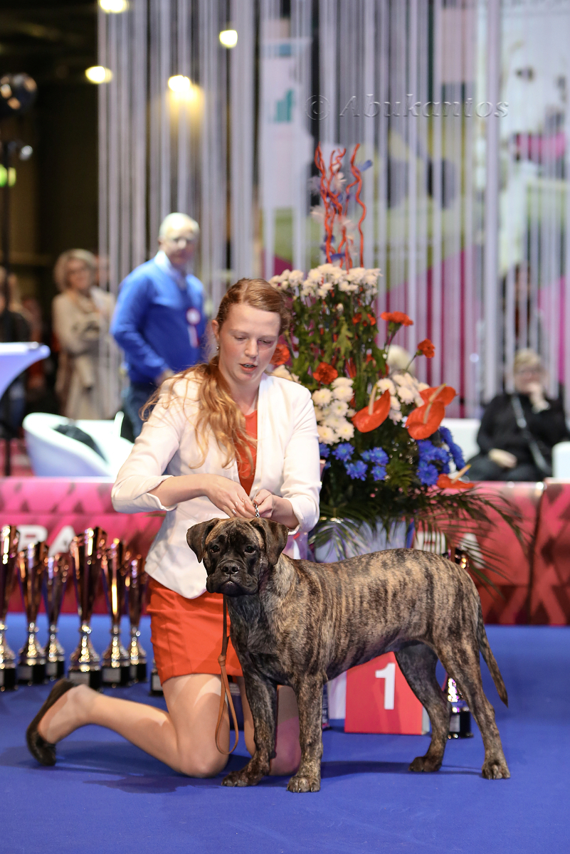 Burn Da Bridge Legendary Hills Best MINOR PUPPY , Europea promise